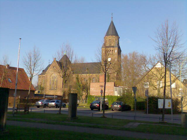 Pfarrkirche von Hiddingsel, Deutschland